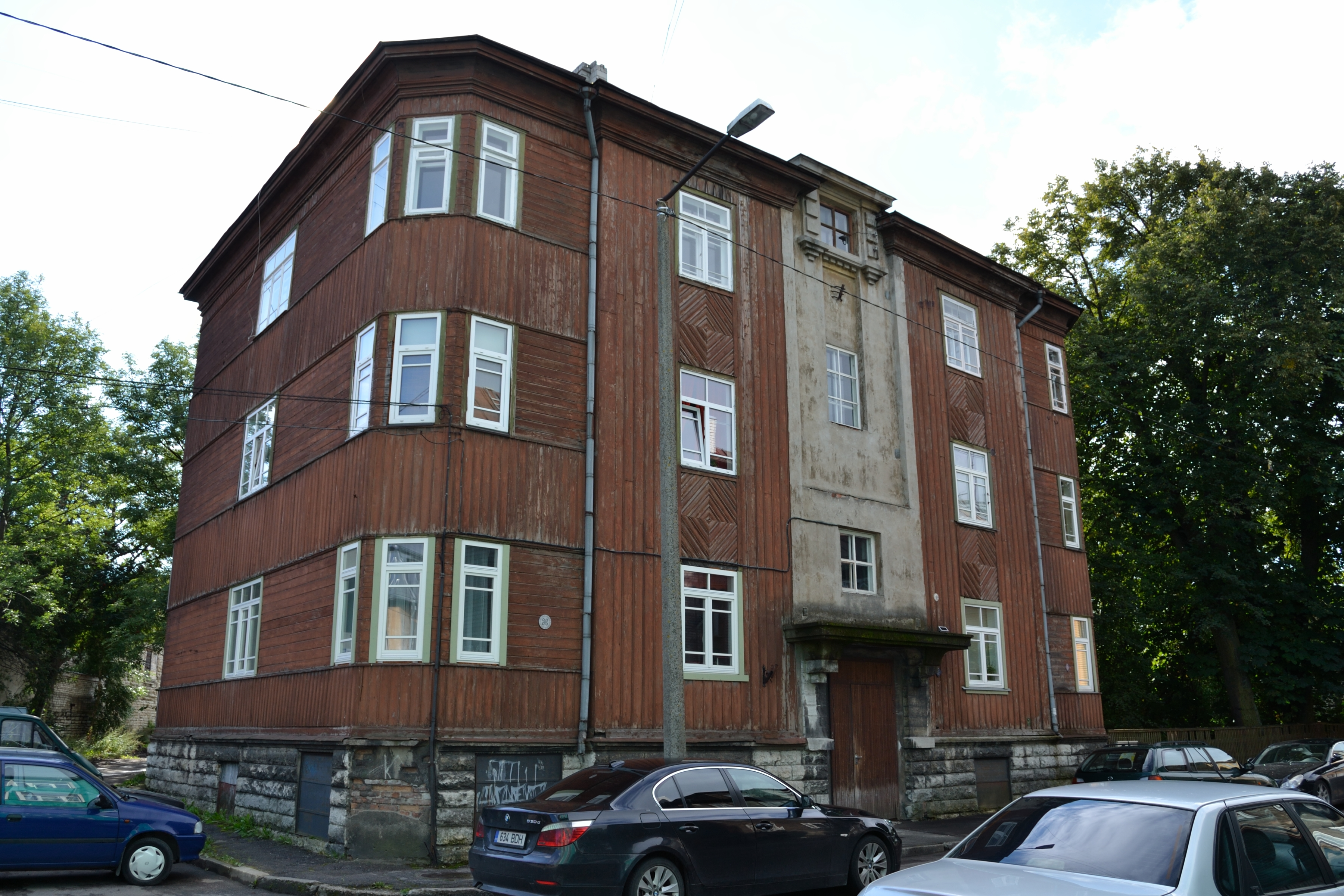 Tallinn, elamu Valgevase 11, 1932